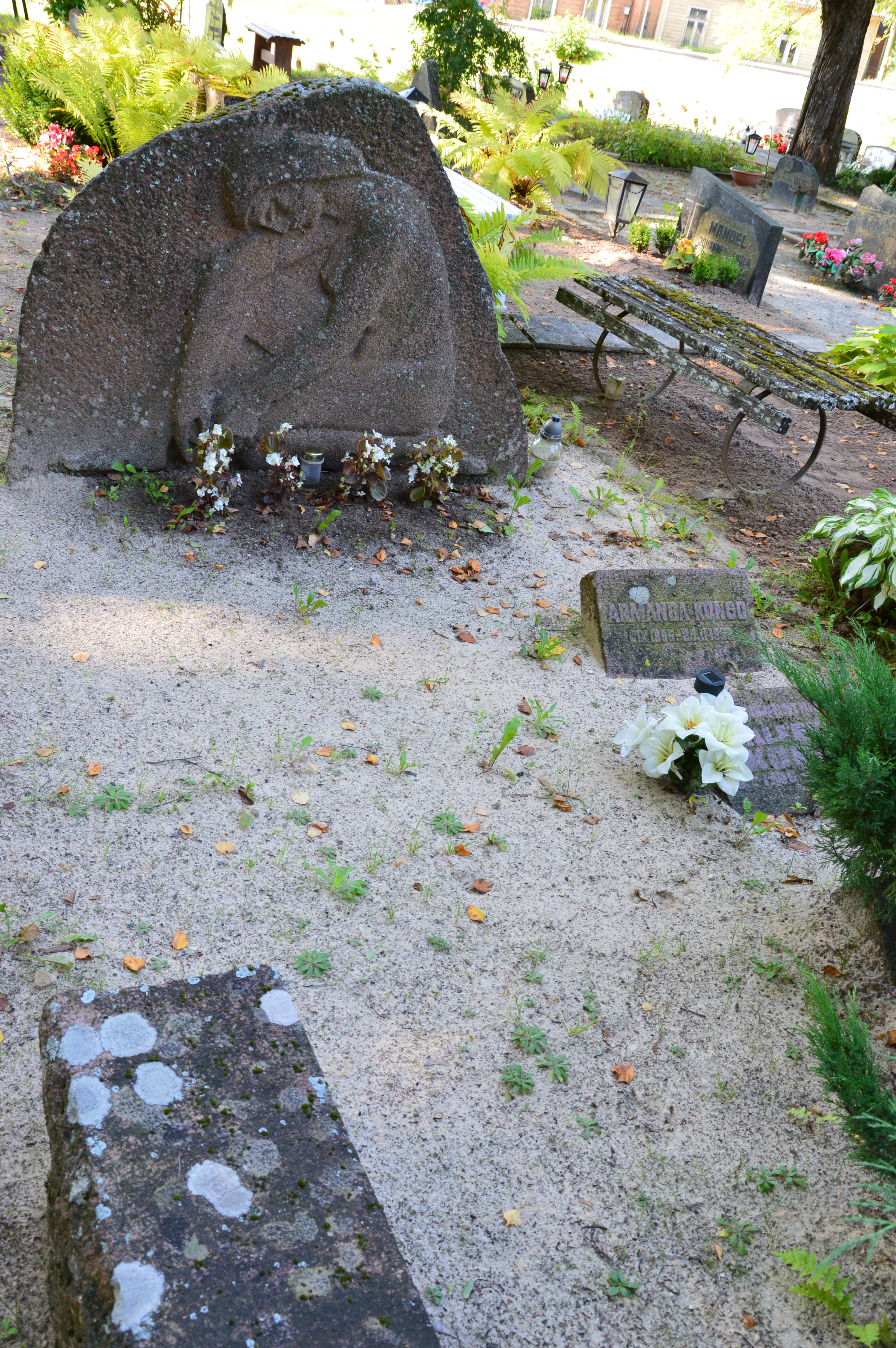 Kanepi-Mäe kalmistu. Alfred Kongo haud.